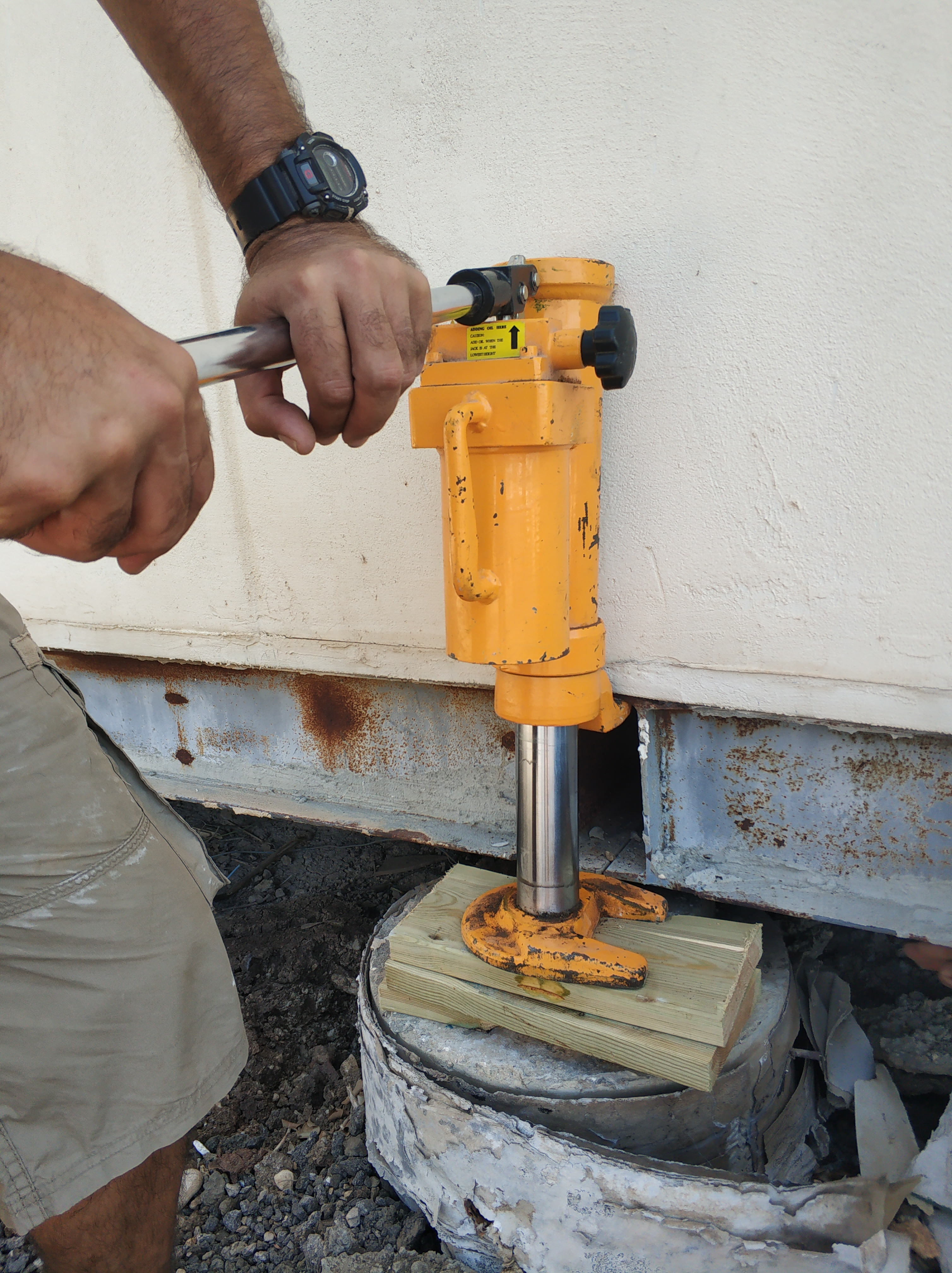 מגבה בעל כושר הרמה של משקל קרוואן